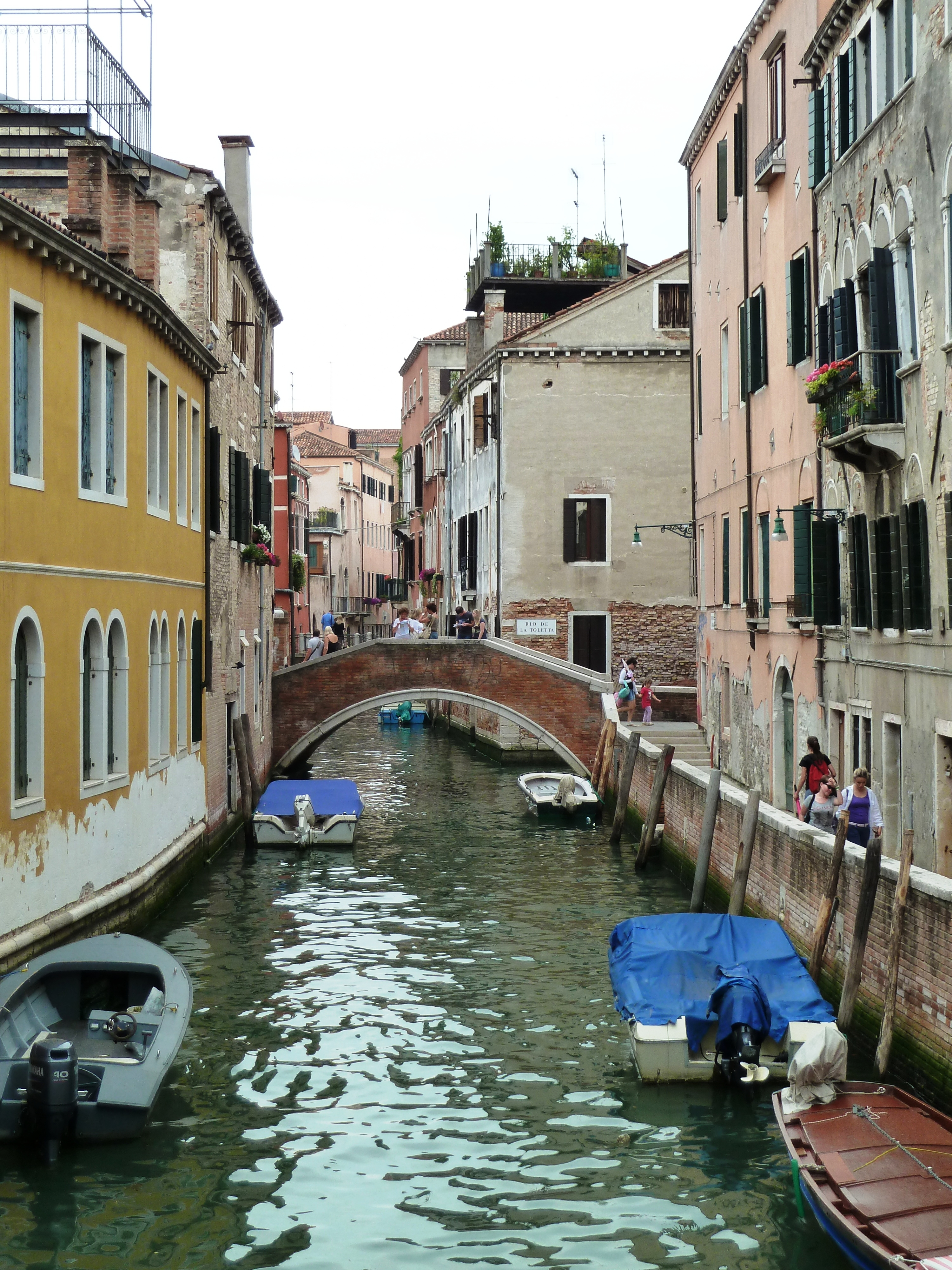 Rio del Malpaga (Venice)